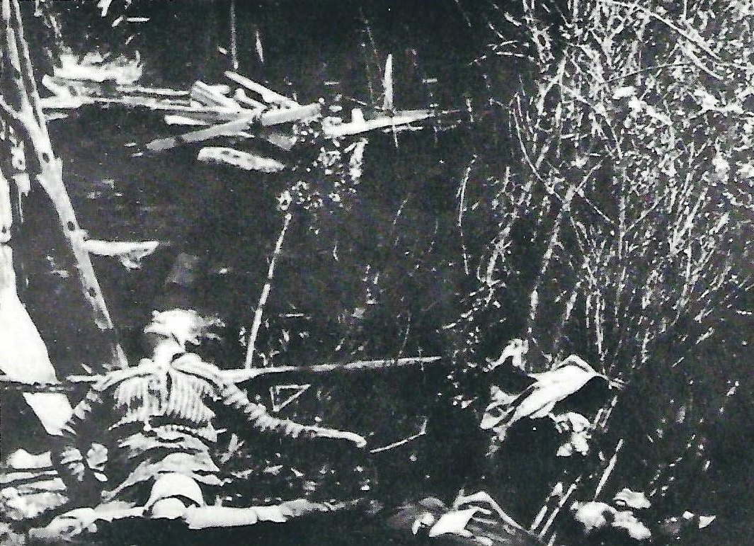 Il cadavere di Ofelia Michelacci, vittima della strage di Vallucciole